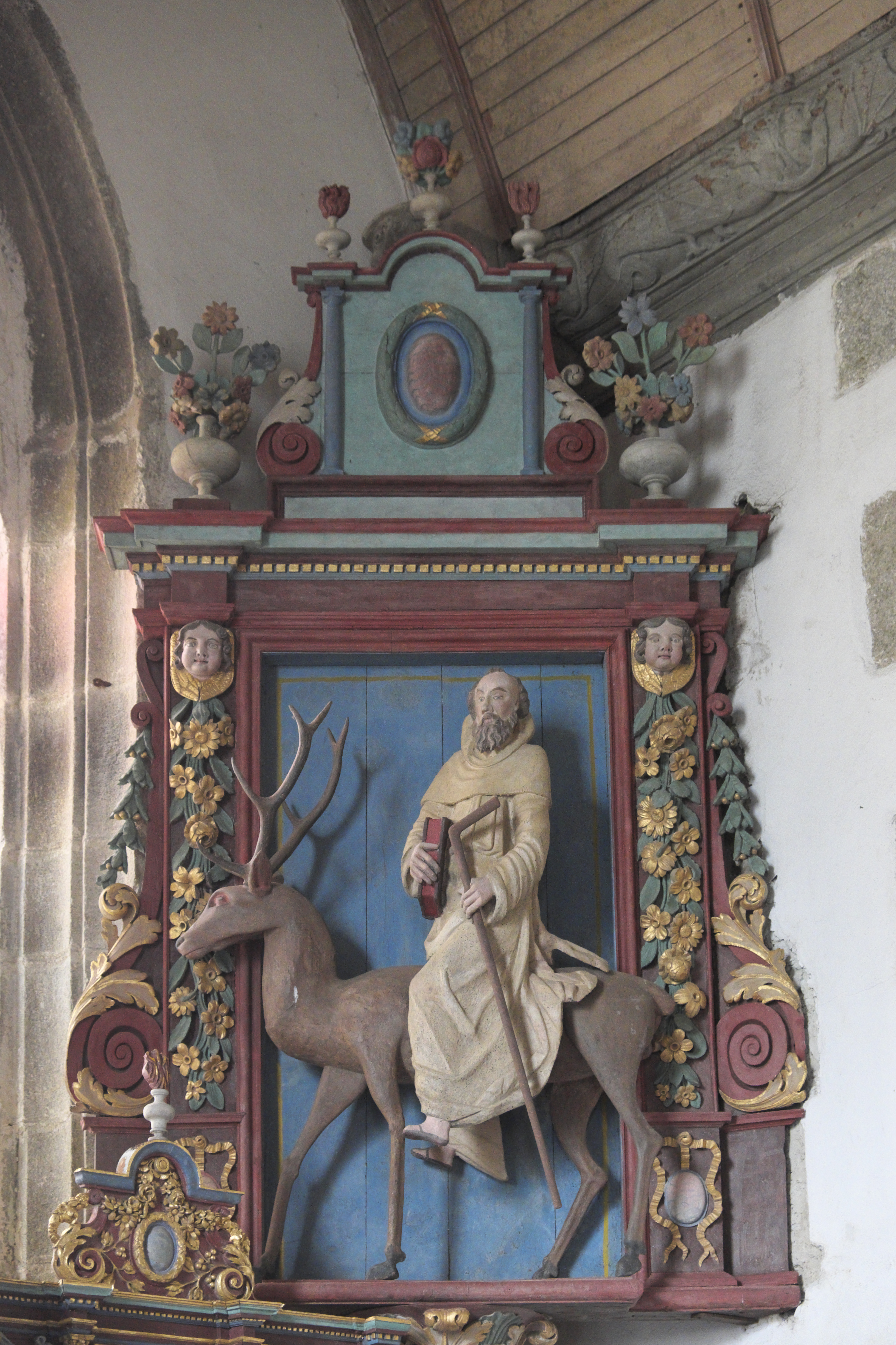 Katholische Kirche Saint-Edern in Lannédern im Département Finistère (Region Bretagne/Frankreich), Skulptur des heiligen Edern auf einem Hirsch reitend, aus dem 17. Jahrhundert